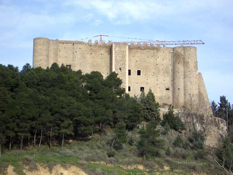 Miglionico - Castello del Malconsiglio